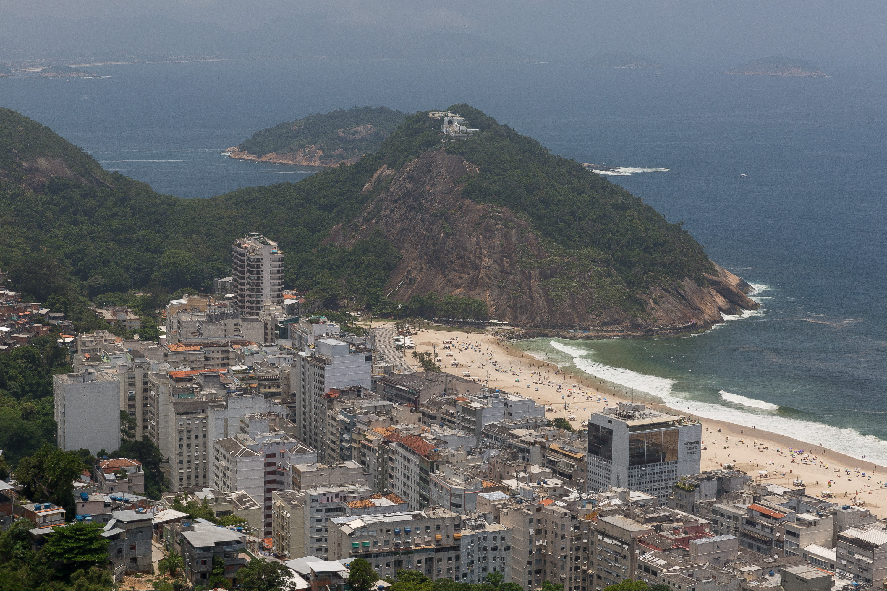 Vista aérea da Praia e Pedra do Leme, localizados na cidade do Rio de Janeiro